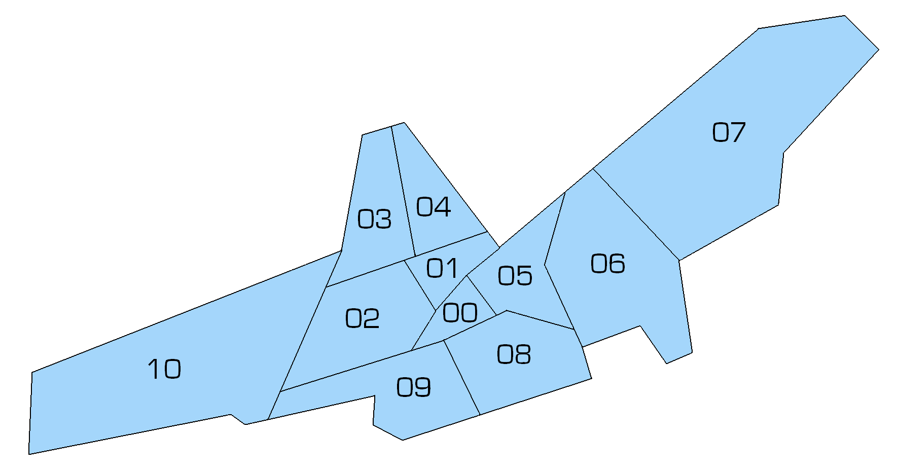 official districts of Landshut City, Lower Bavaria, Germany 00 Altstadt 01 Nikola 02 West 03 Wolfgang 04 Industriegebiet 05 Peter und Paul 06 Schönbrunn 07 Frauenberg 08 Berg 09 Achdorf 10 Münchnerau